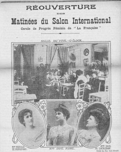 Fotos da Reabertura do Salon International do Cercle de Progrés de "La Française" publicado na revista La Française em 25 de outubro de 1908, incluindo os retratos de Paul de Lauribar, Jane Misme e Mireille de Mogival.